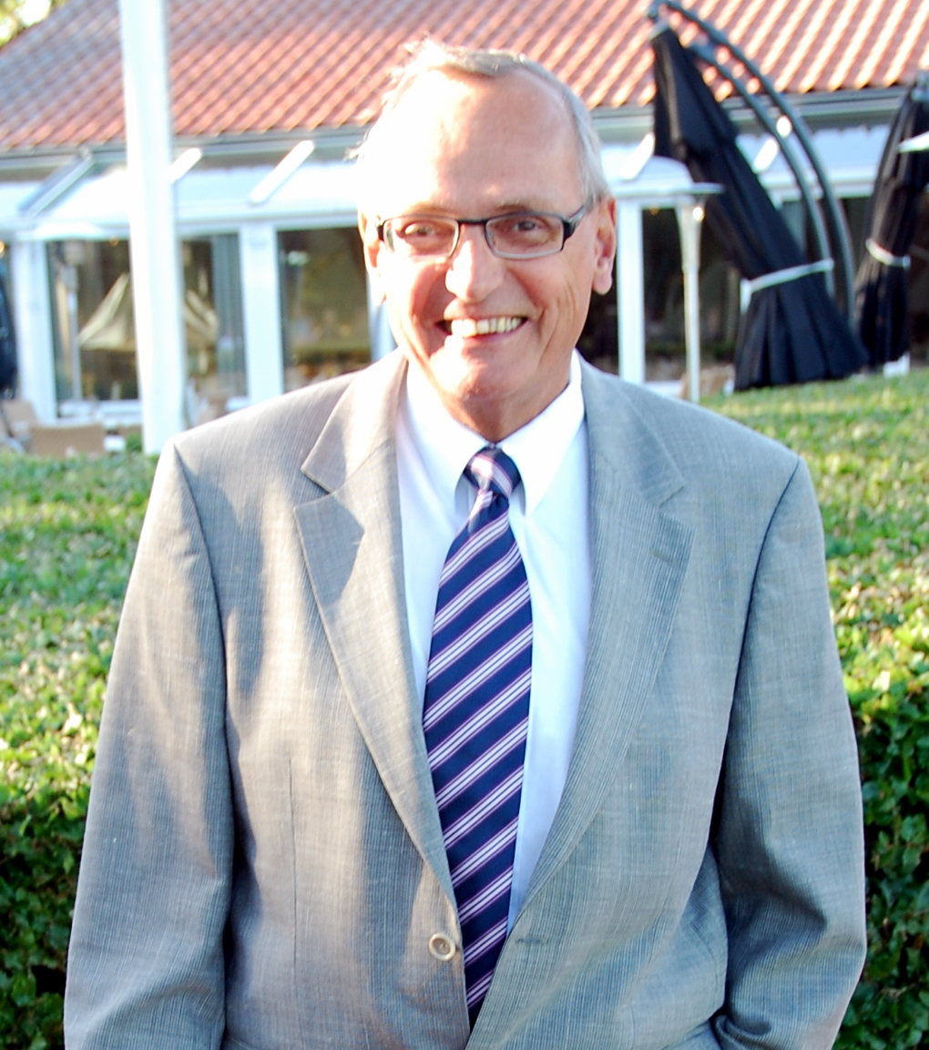 Bent Hansen, dansk politiker, formand for Region Midtjylland og Danske Regioner.